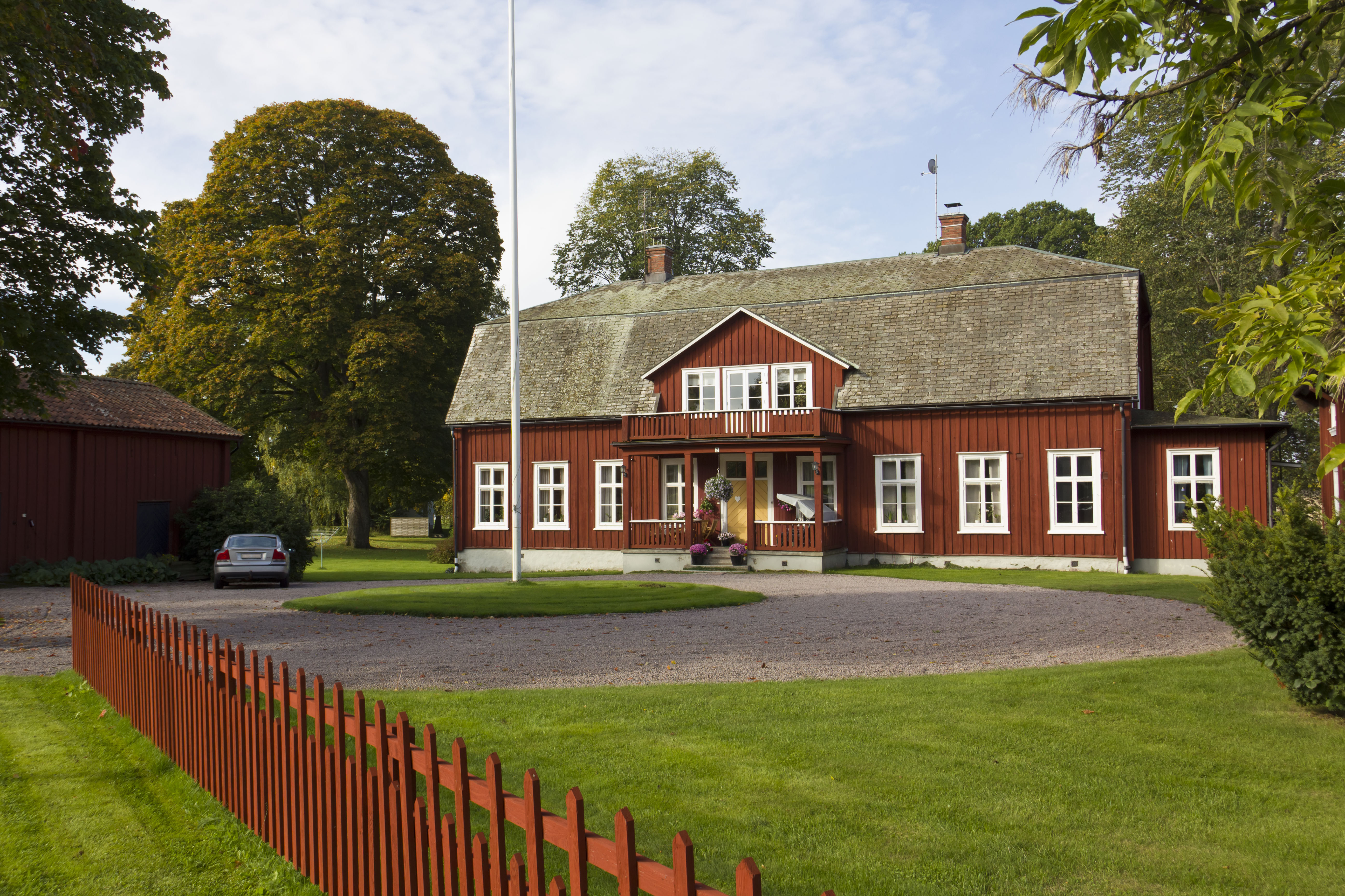 Hova prästgård (Hova Prästbol 3:2)